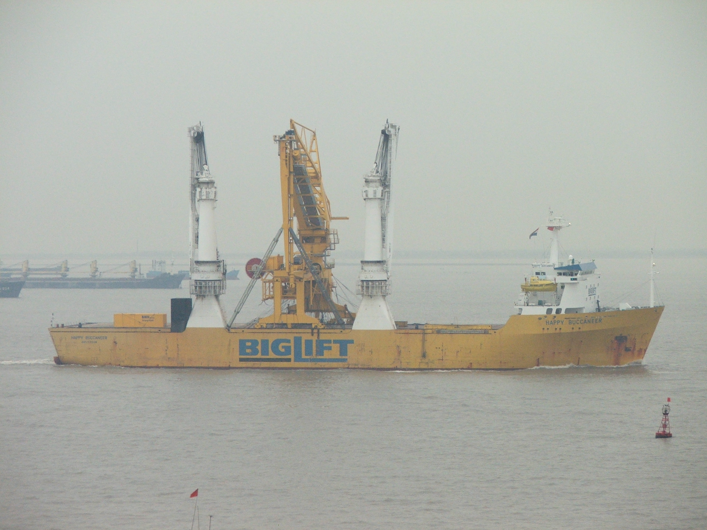 Schwergutschiff Happy Bucaneer mit Decksladung Information about Happy Buccaneer may be found at IMO 8300389. A ship can change her name and flag state through time, but the IMO number remains the same through the hull's entire lifetime. Therefore, it's useful to identify a ship through her IMO number.